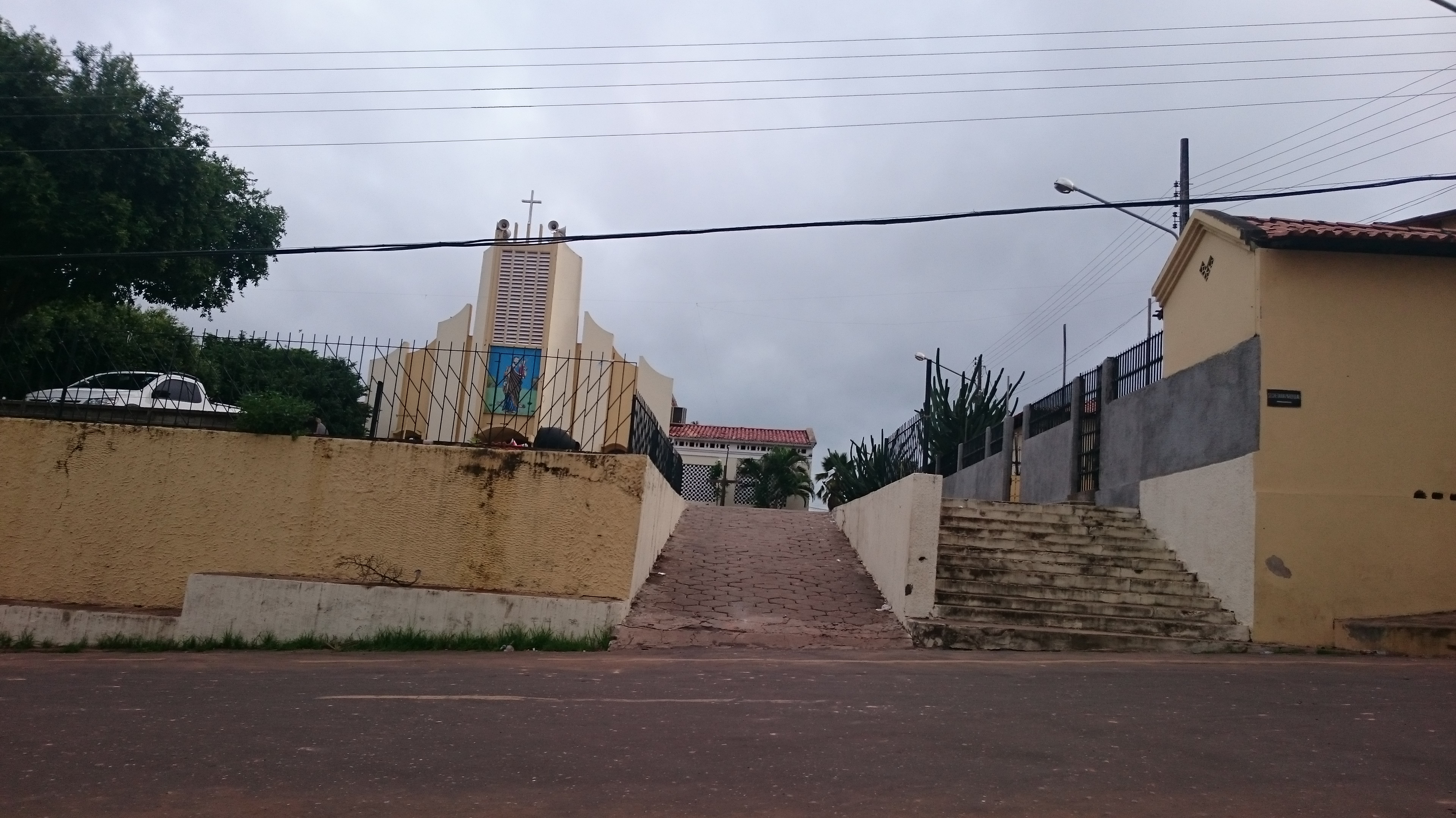 Igreja Matriz de São José, Lago da Pedra - MA